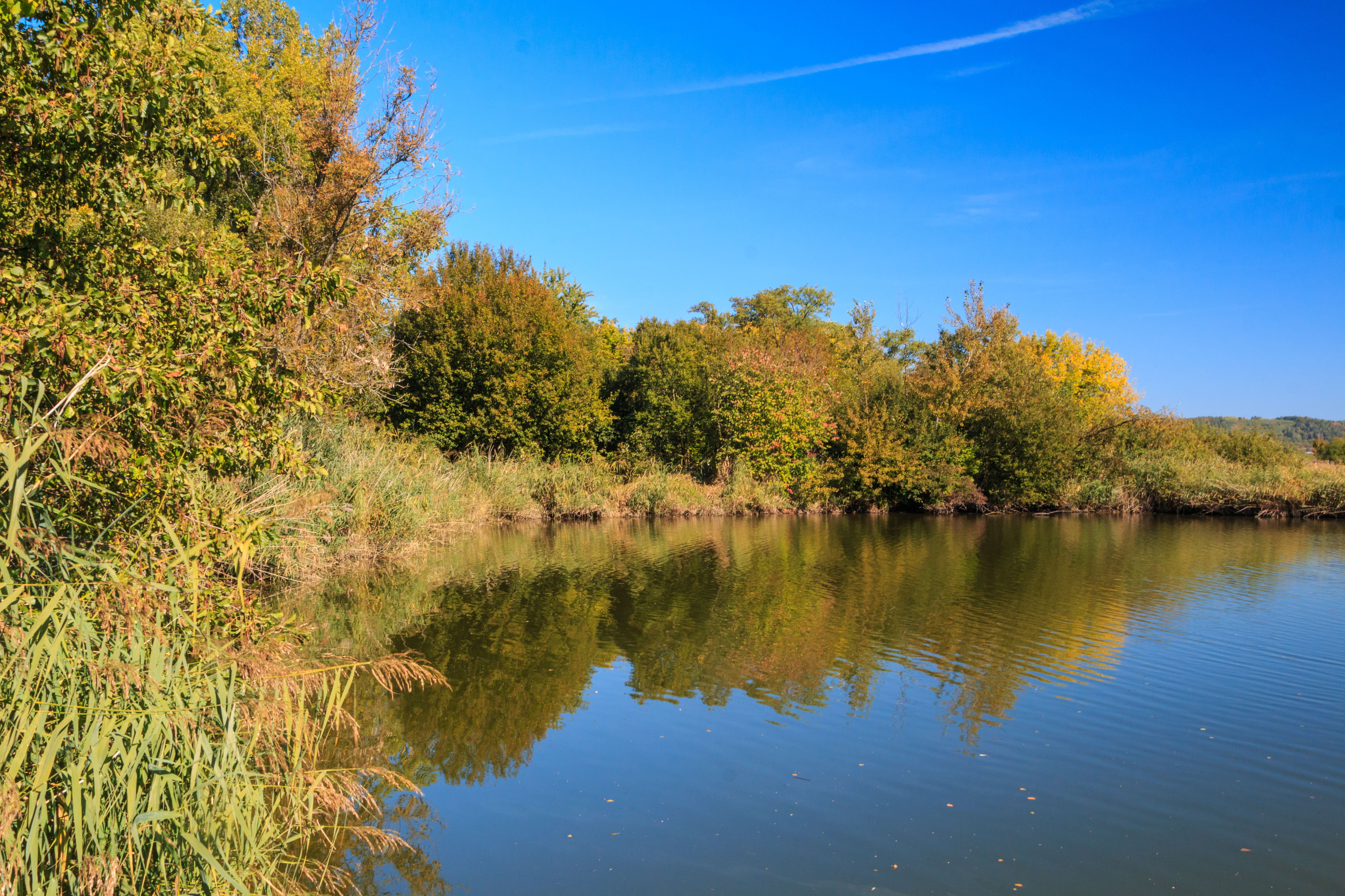 Stržský rybník u Budy Project: Vodstvo.